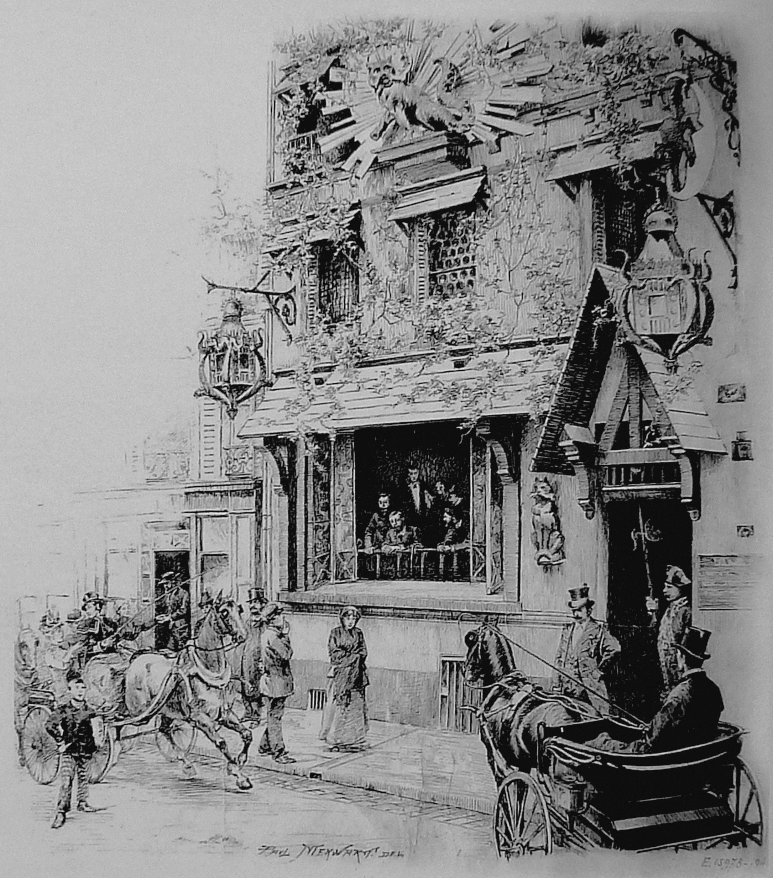 Cabaret Le Chat Noir, au n°12, rue de Laval (aujourd'hui rue Victor-Massé) 9e arrondissement de Paris. Gravure de Paul Merwart.